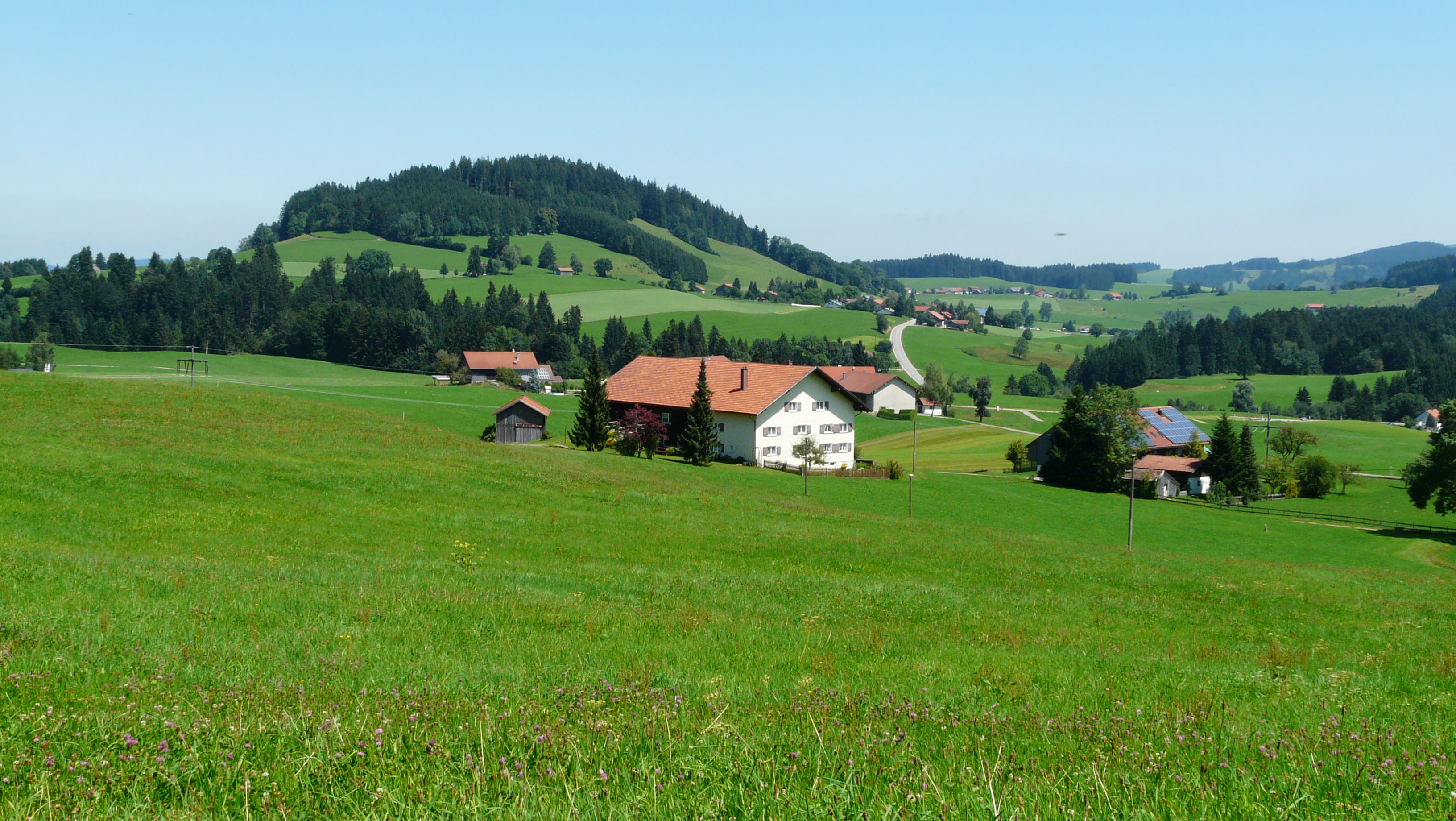 Balzer Berg von Süden, Weiler-Simmerberg